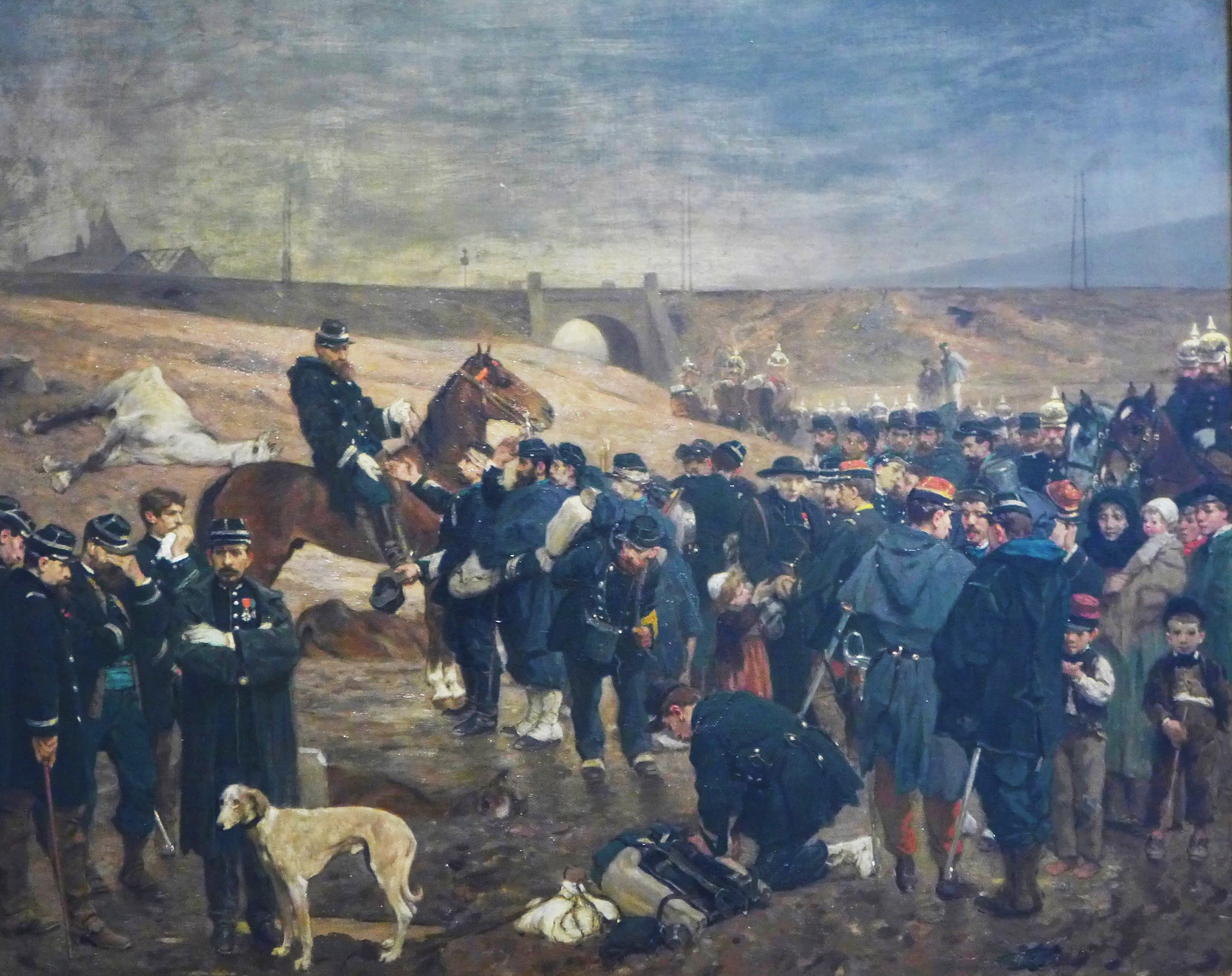 Théodore Devilly (Metz 1818-Nancy 1886): Les Adieux des soldats à leurs officiers, dit Les Adieux, peint 1885, Les adieux sont une réduction au moyen format et le seul témoignage d´on grand tableau exposé de Devilly au Salon de 1874. Le 29 octobre 1870, à l´issue du siège de Metz, 226 000 militaires français, dont trois marécheaux et cinquante généraux, sont livrés aux Prussiens en vertu du protocole de la capitulation signé la veille près de Metz, à Montigny. C´est dans cette localité, devant la chaussée surélevée de la ligne de chemin de fer Paris-Metz, que l´artiste a placé la scène d´adieux de quelques soldats prisonniers à leurs officiers restés libre.